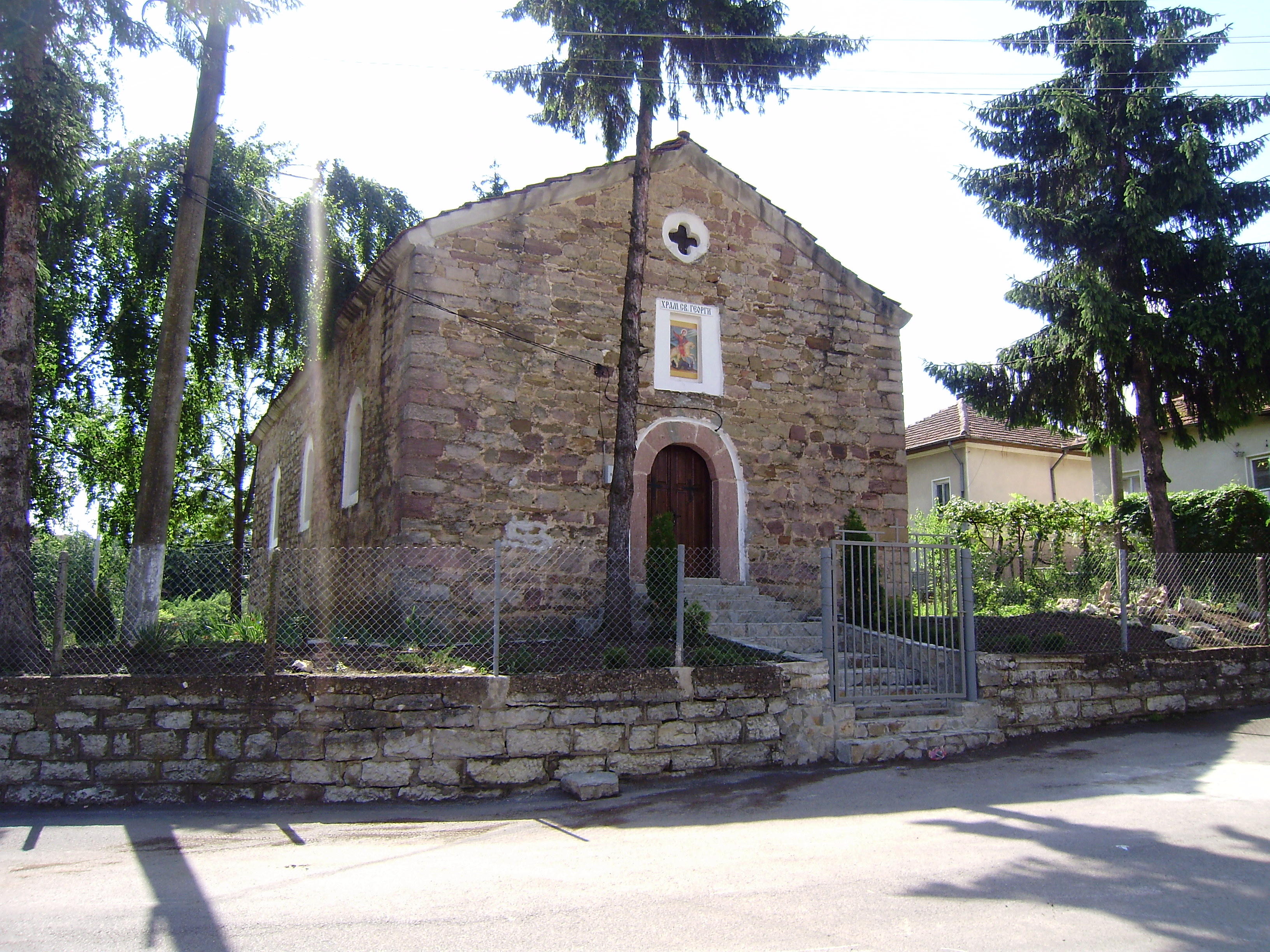 Църквата „Св. Георги“ в село Репляна